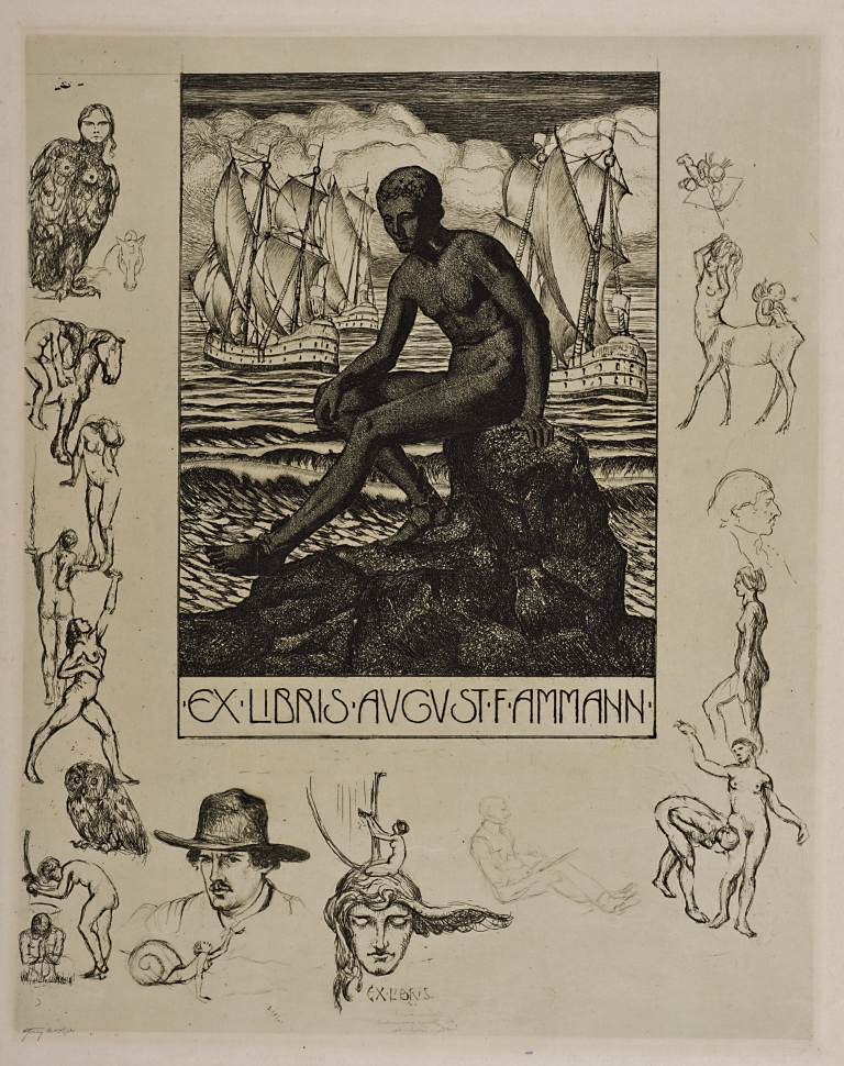 Ex Libris August Ammann; vgl. exlibris-deg.de (Nr. 6); Exlibris-Sammlung Anderle, Landesmuseum für Kärnten